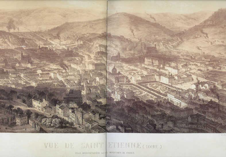 Saint-Etienne France